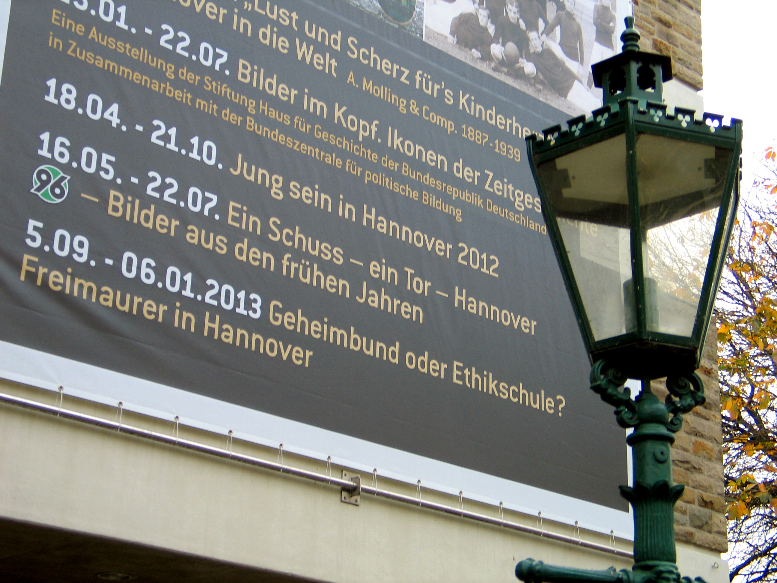 Das Historische Museum zeigt 2012 unter anderem die Ausstellung Geheimbund oder Ethikschule. Freimaurer in Hannover, vom 5.09.2012 bis 06.01.2013 ...